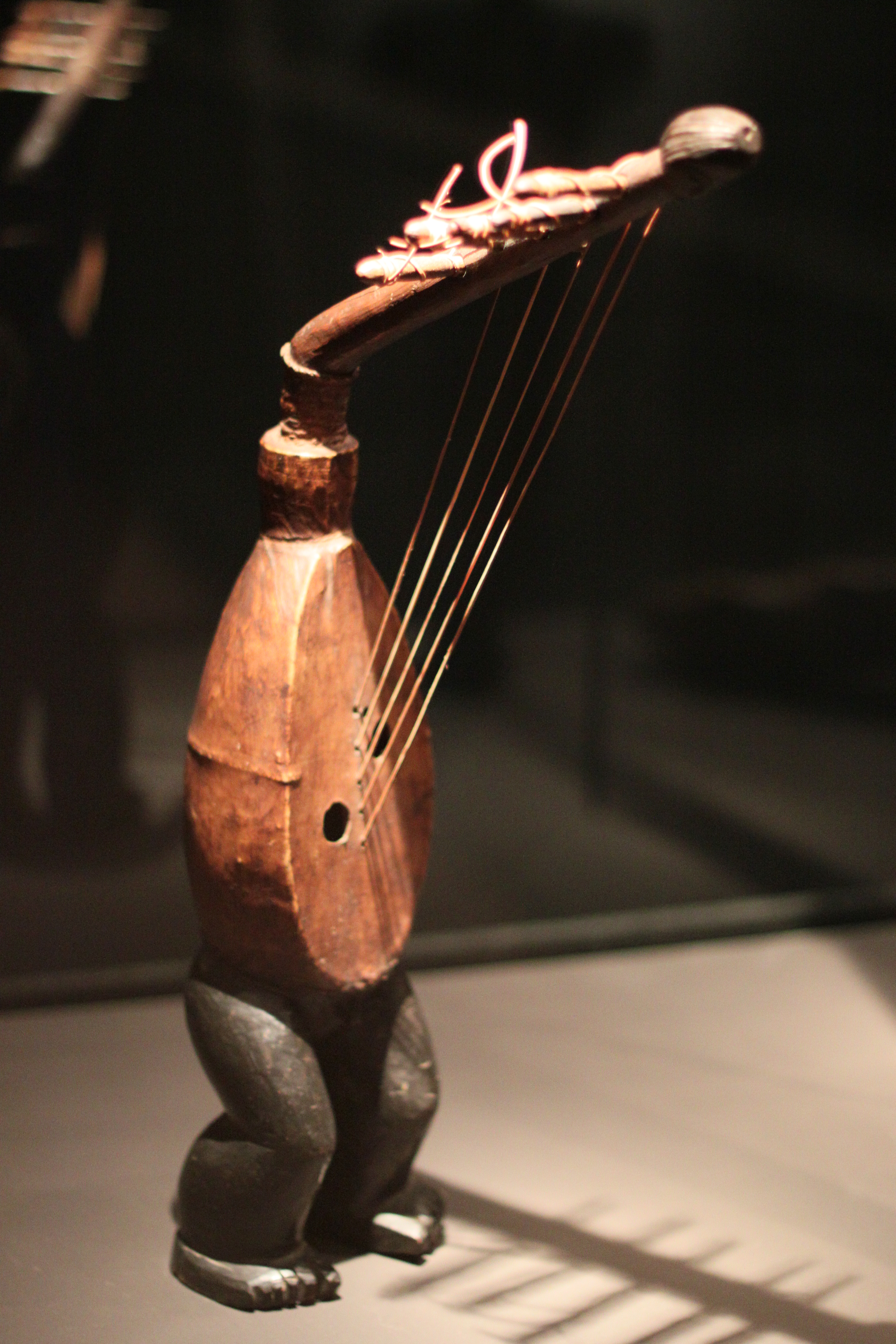 Bogenharfe, Demokr. Rep. Kongo, Ngbaka, 20. Jh.; Holz, Tierhaut, Pflanzenfasern; Afrikaabteilung im Ethnologischen Museum, Berlin, Inv. nr. III C 44881 (erworben im Kunsthandel, 1987)